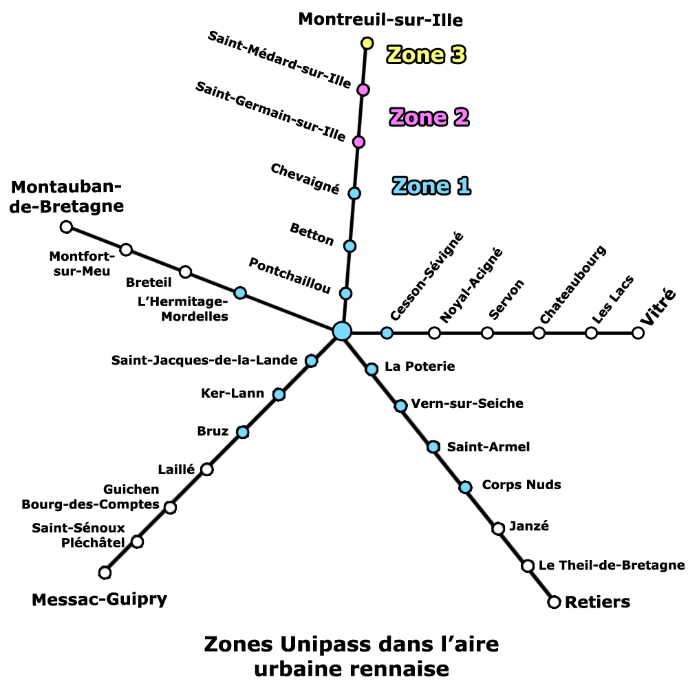 Schéma des haltes ferroviaires compatibles avec le système Unipass dans l'aire urbaine rennaise.